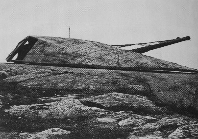 Pjäs 3 på 15-centimeters batteriet Björkö (BJ), år 1943